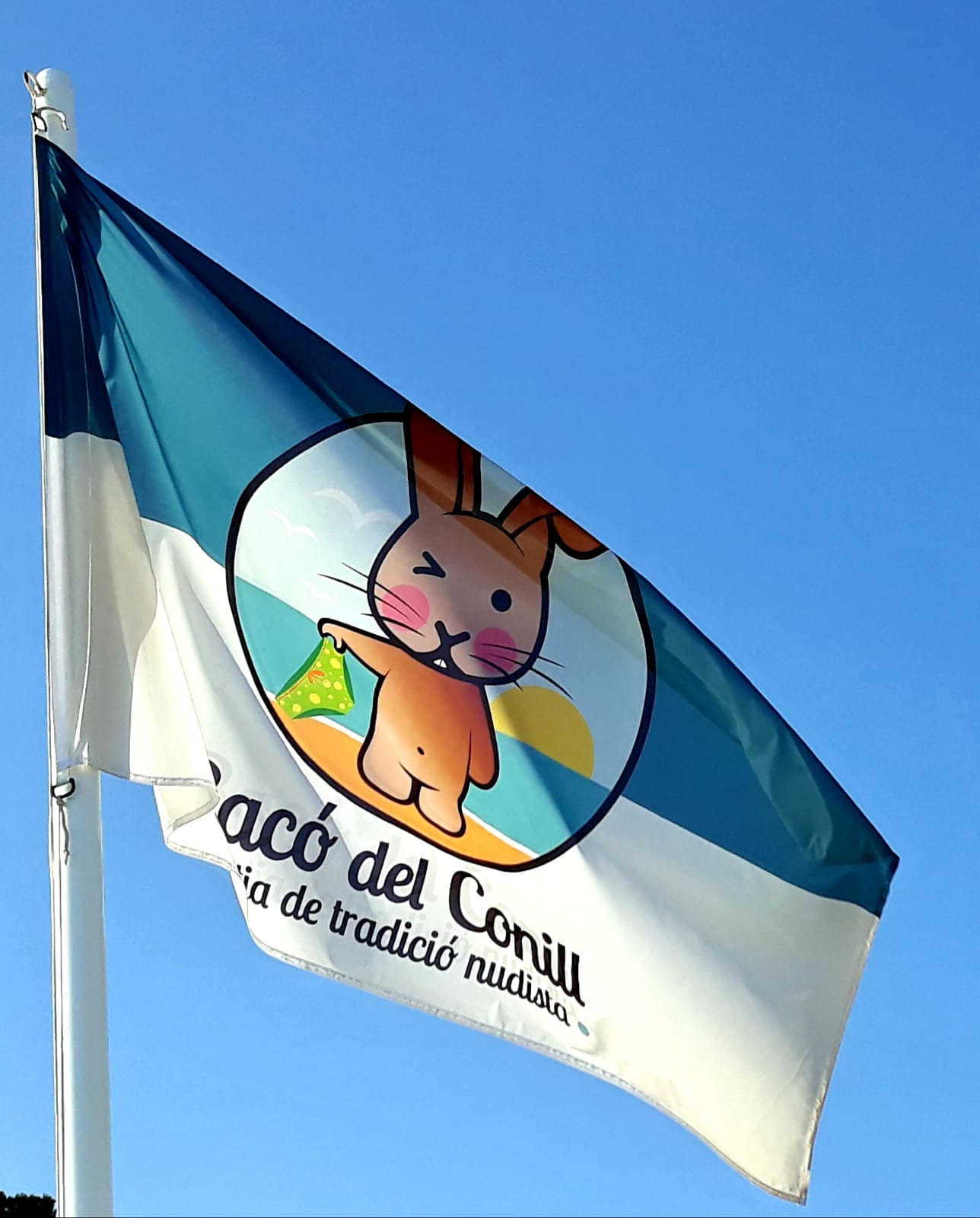 Bandera con la imagen registrada del Racó del Conill y su tradición nudista.